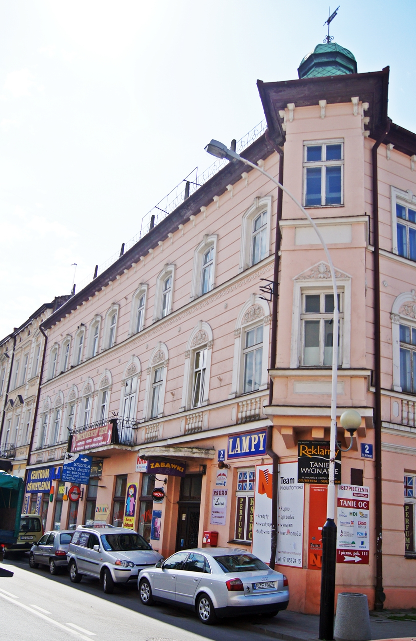 Rzeszów, Plac Wolności 2 - "Hotel Krakowski"